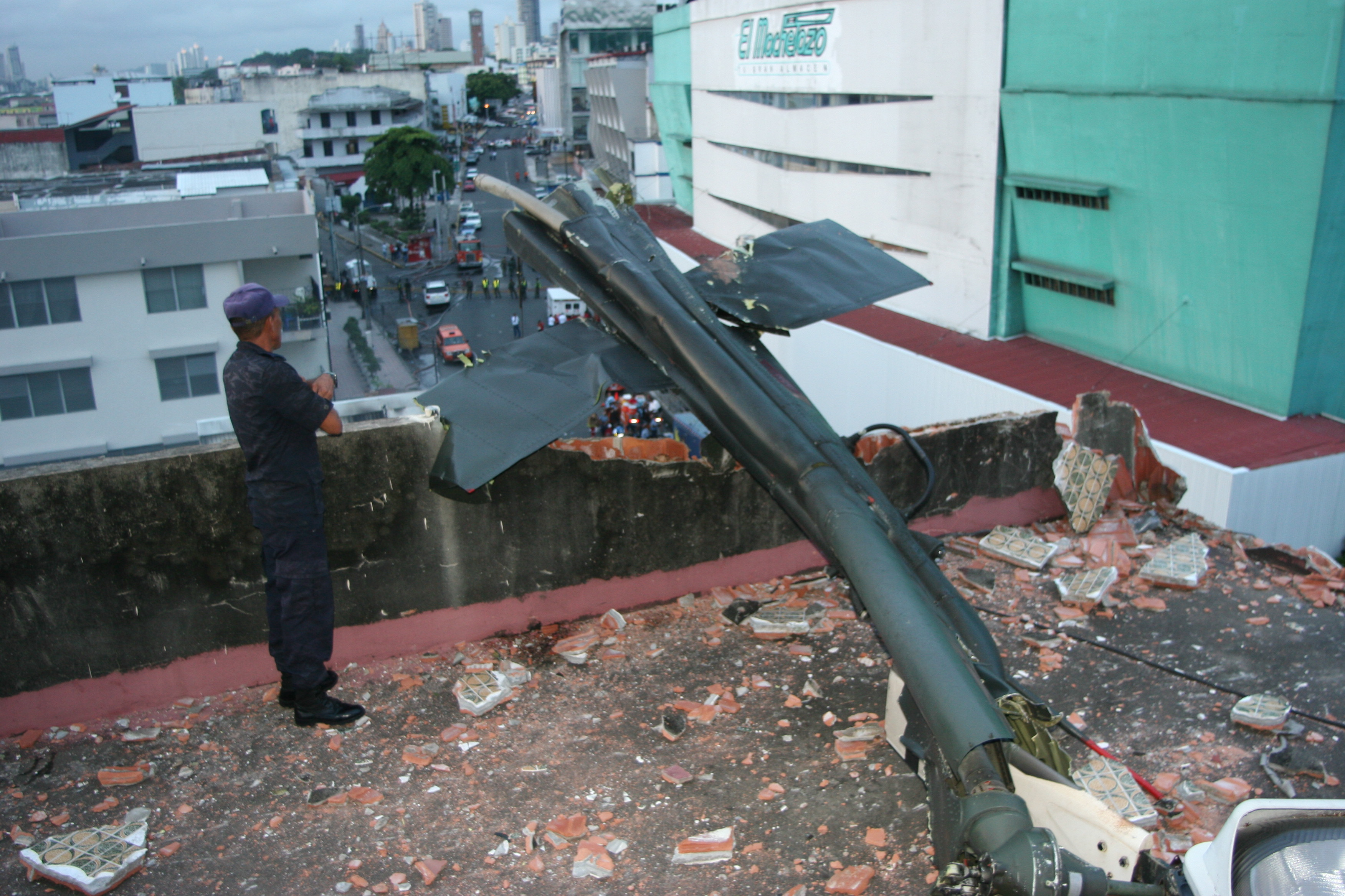 Resultado del helicoptero después del accidente en Ciudad de Panamá donde falleció el General de Carabineros José Bernales